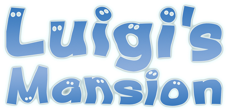 Logo des Computerspiels Luigi’s Mansion